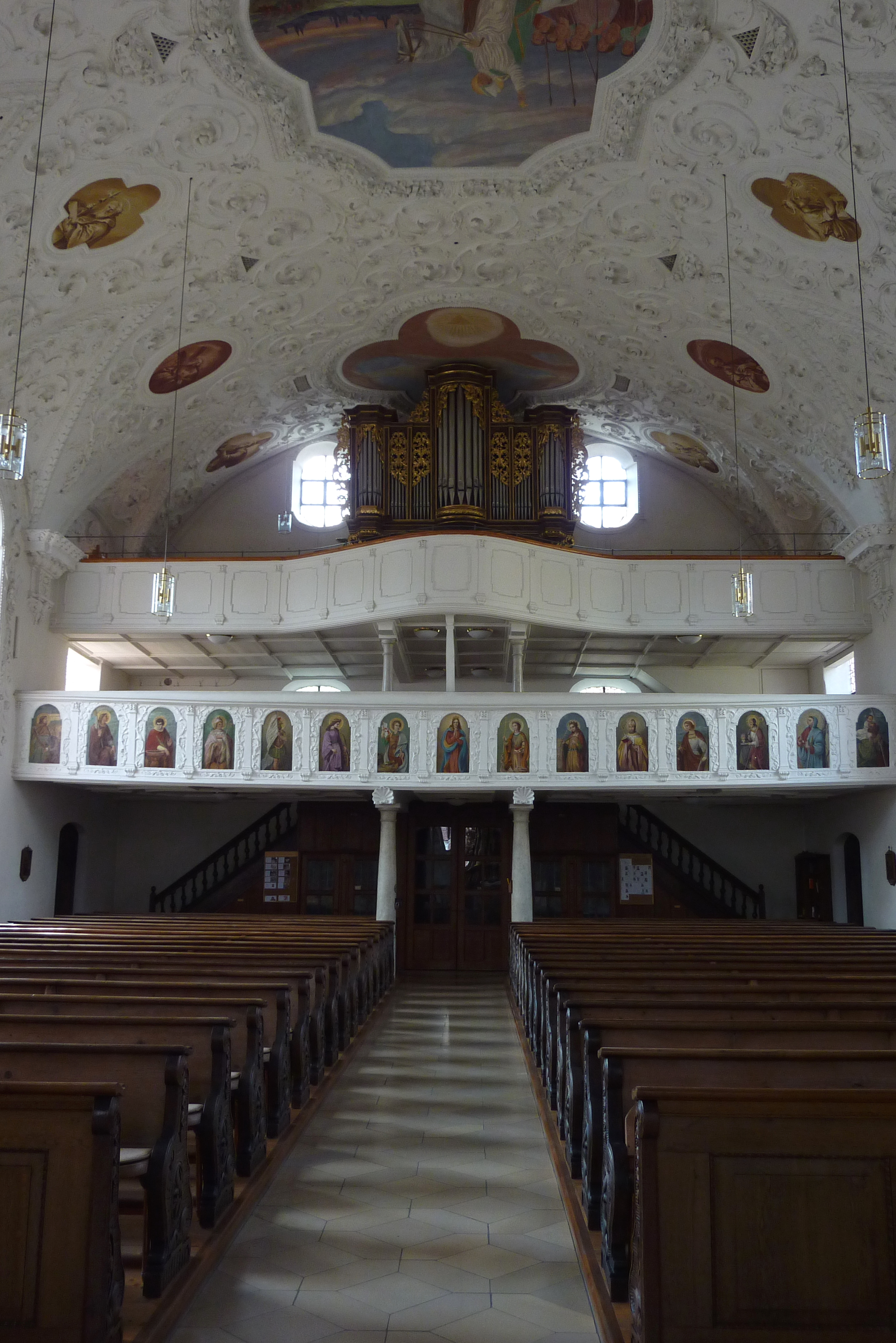 Katholische Pfarrkirche St. Martin in Wertingen im Landkreis Dillingen an der Donau (Bayern), Innenraum mit Blick zur Empore